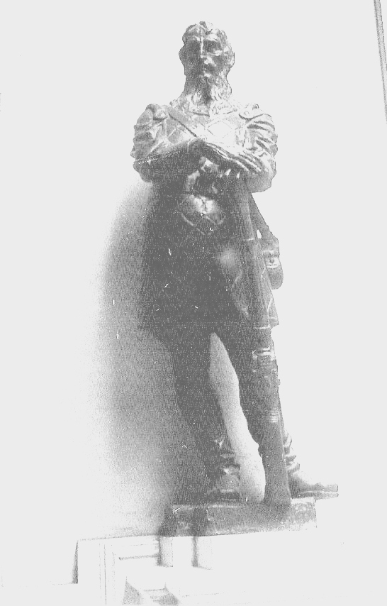 Francisco Dias Velho (bandeirante)em bronze, por Nicola Rollo, para o Museu Paulista (Ipiranga).